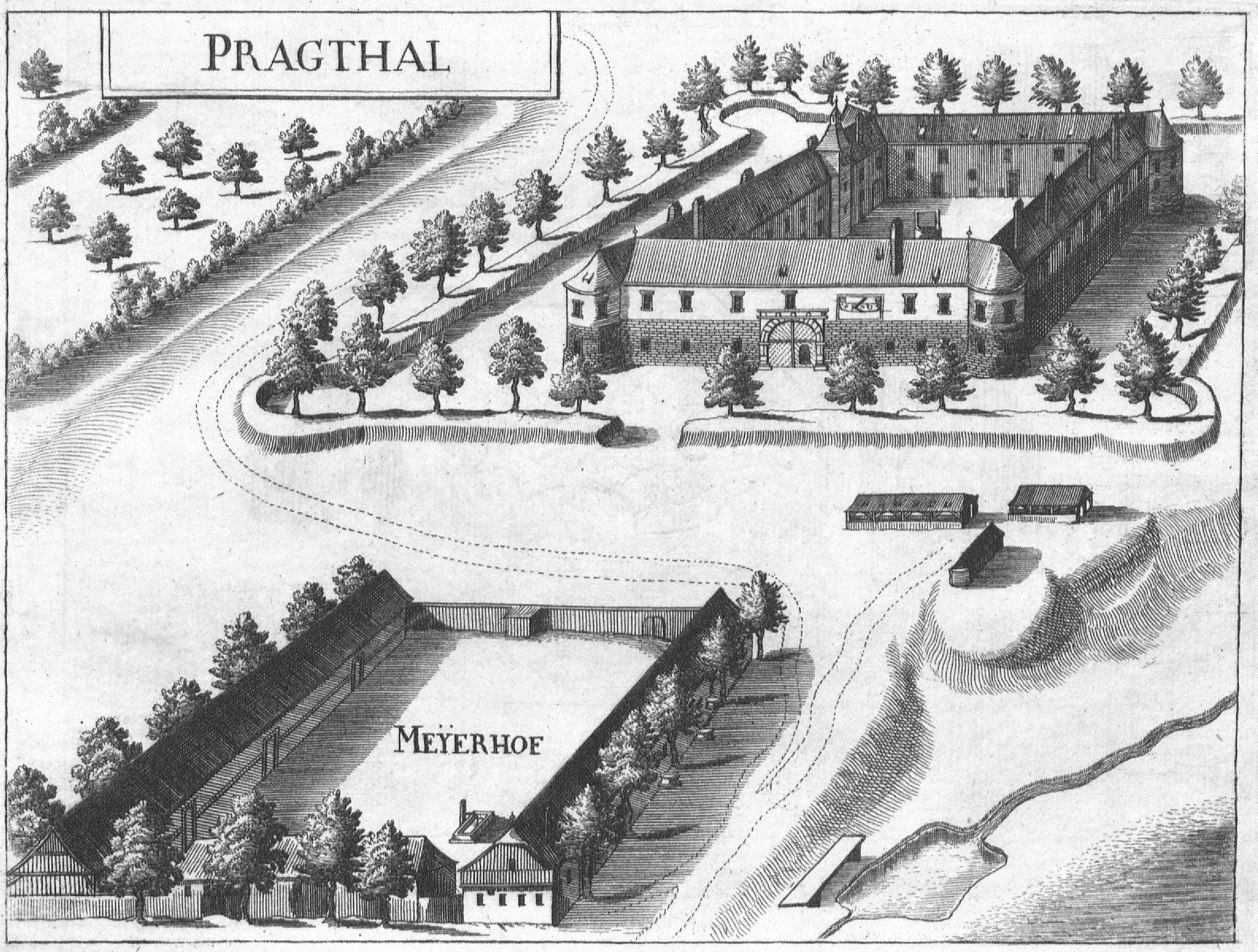 Schloss Pragthal mit Meierhof